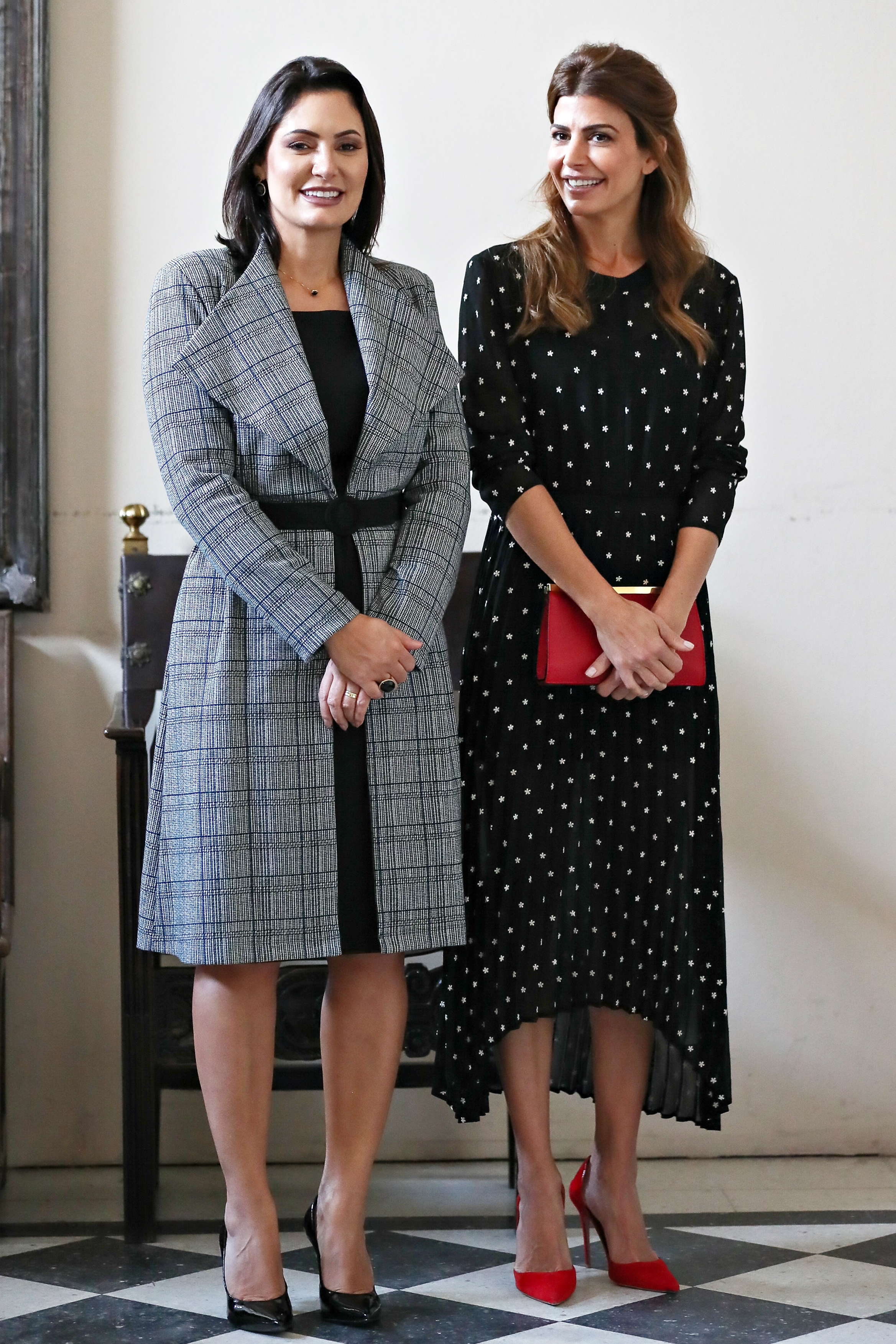 06/06/2019 Almoço oficial oferecido pelo Senhor Mauricio Macri, Presidente da República Argentina (Buenos Aires - Argentina, 06/06/2019) Almoço Oficial oferecido pelo Senhor Mauricio Macri, Presidente da República Argentina. Foto: Marcos Corrêa/PR